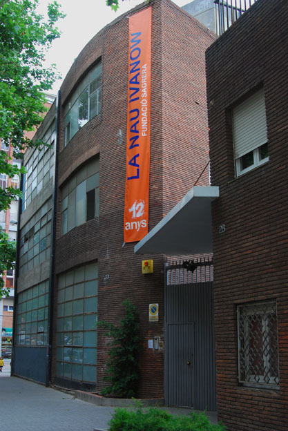 Façana de la Nau Ivanow Hondures, 28-30